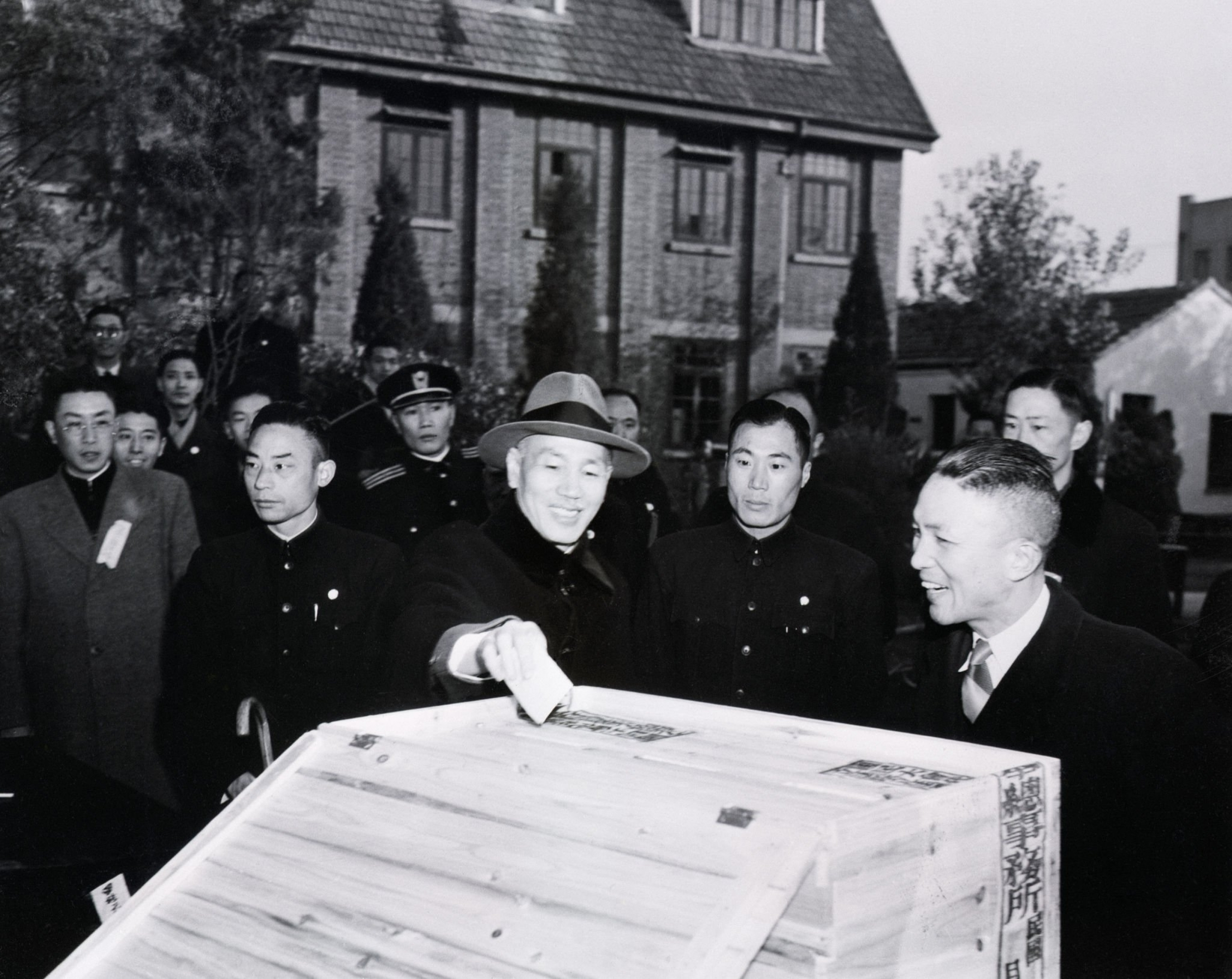 The copyright of this picture has expired! EXPIRED! PD-China 摘要 该图片出处：国民大会秘书处编写：国民大会实录，1948年